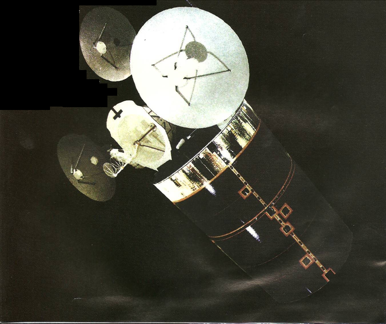 NRO Satellite Data System communications satellite